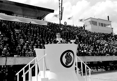 写真名 福井国体開会式 年代 昭和43